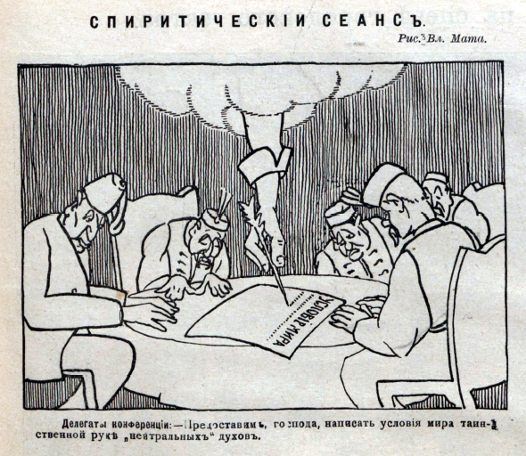 Спиритический сеанс (карикатура, 1912)